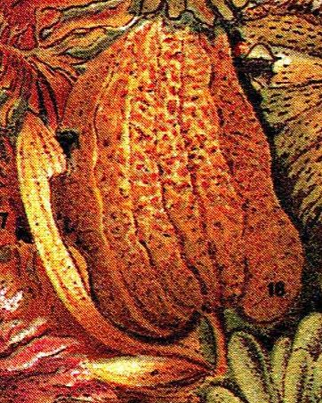 Costaria costata